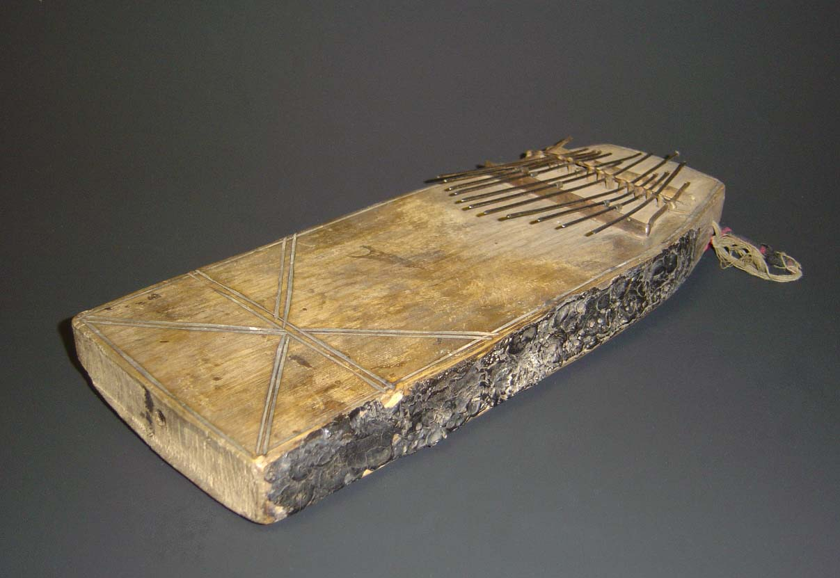 Duimpiano - Muziekinstrument uit Centraal Afrika - instrument uit collectie KMMA Afrikamuseum Tervuren België